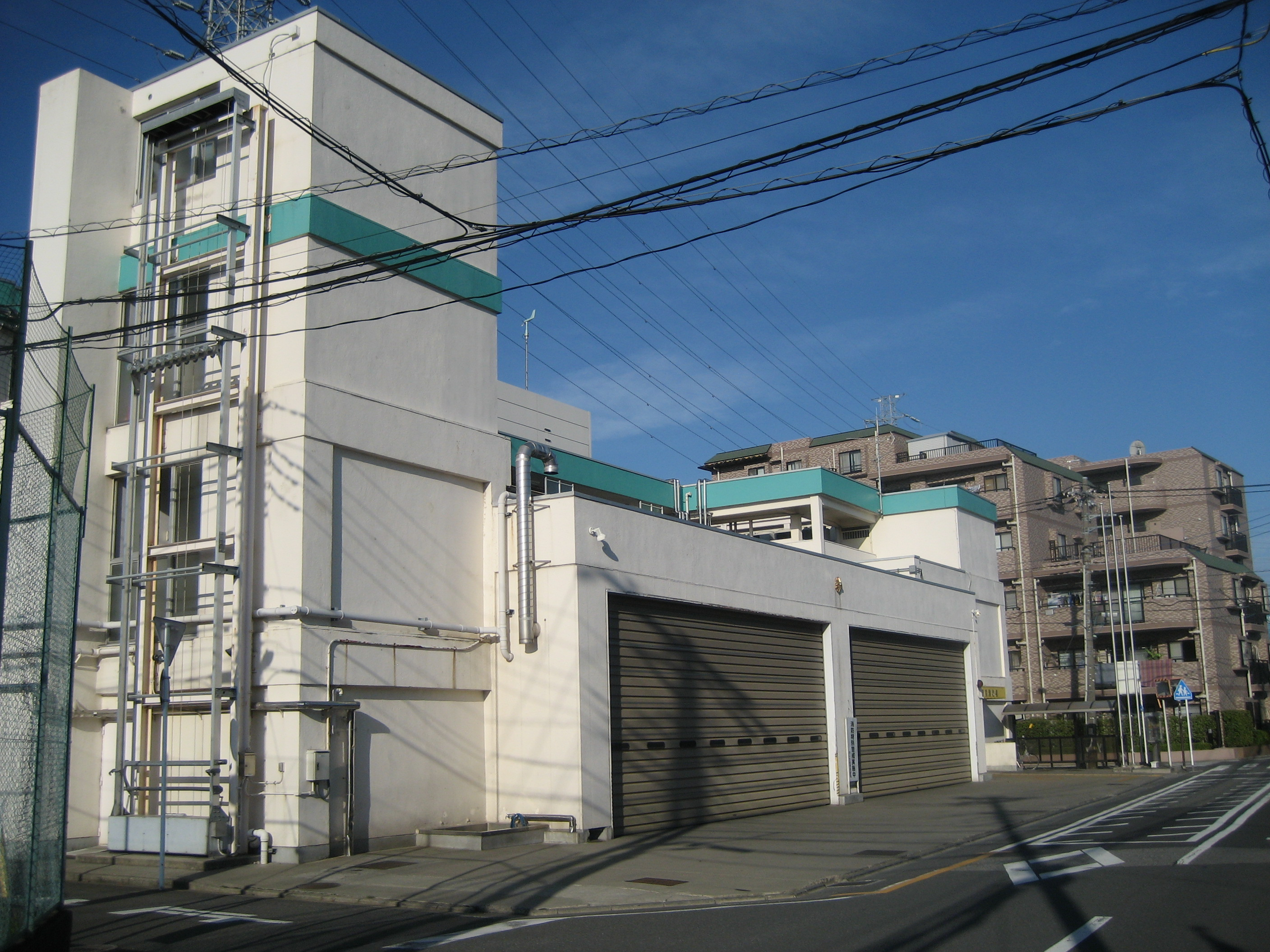 さいたま市消防局南消防署庁舎